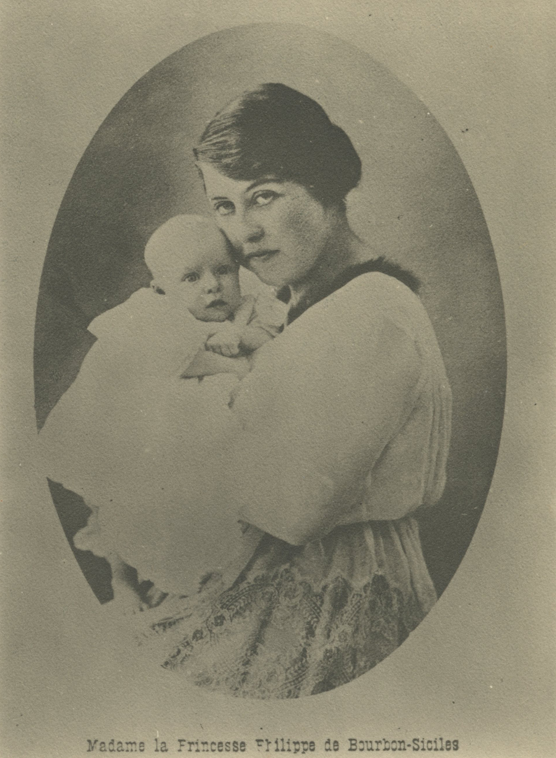 SAR LA PRINCESSE MARIE LOUISE D'ORLÉANS, PRINCESSE PHILIPPE DE BOURBON SICILES ET SON FILS GAETAN